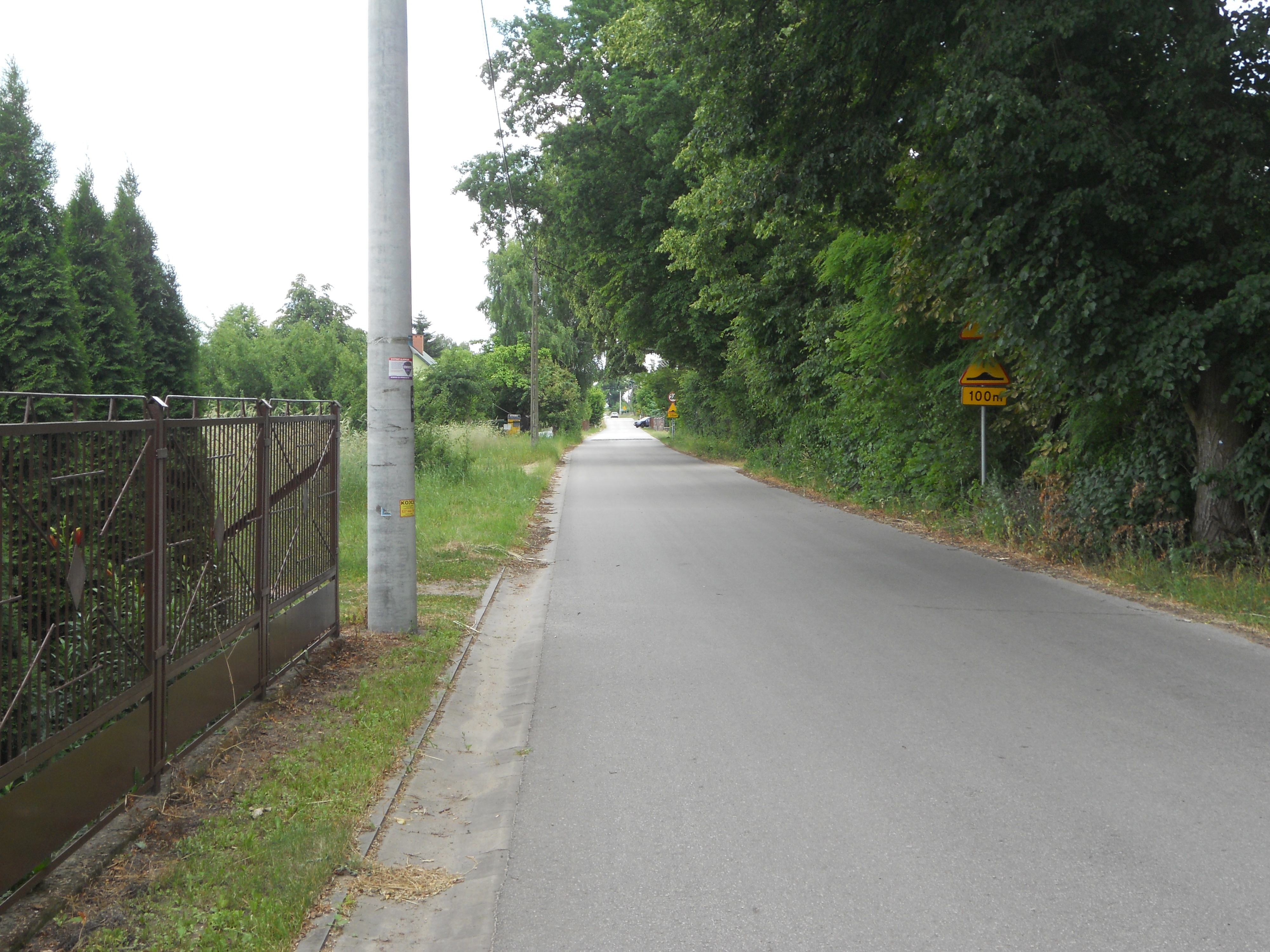 Miejscowość w gminie Siennica